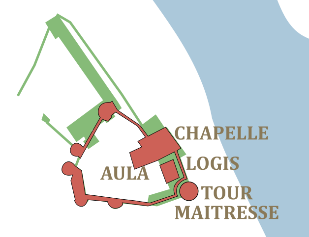 Plan du château de Laval au XIIIème siècle, superposé au château actuel.